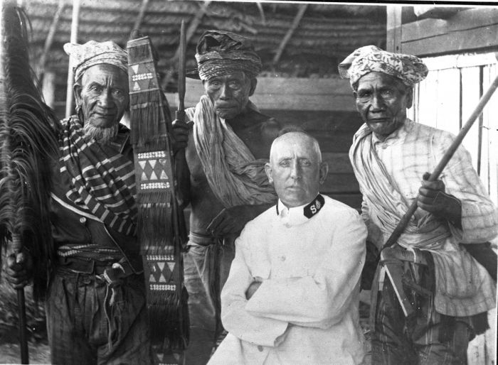 Foto. Een kommandant van het Leger des Heils poseert voor de fotograaf met drie Toradja mannen in traditioneel krijgscostuum, Celebes